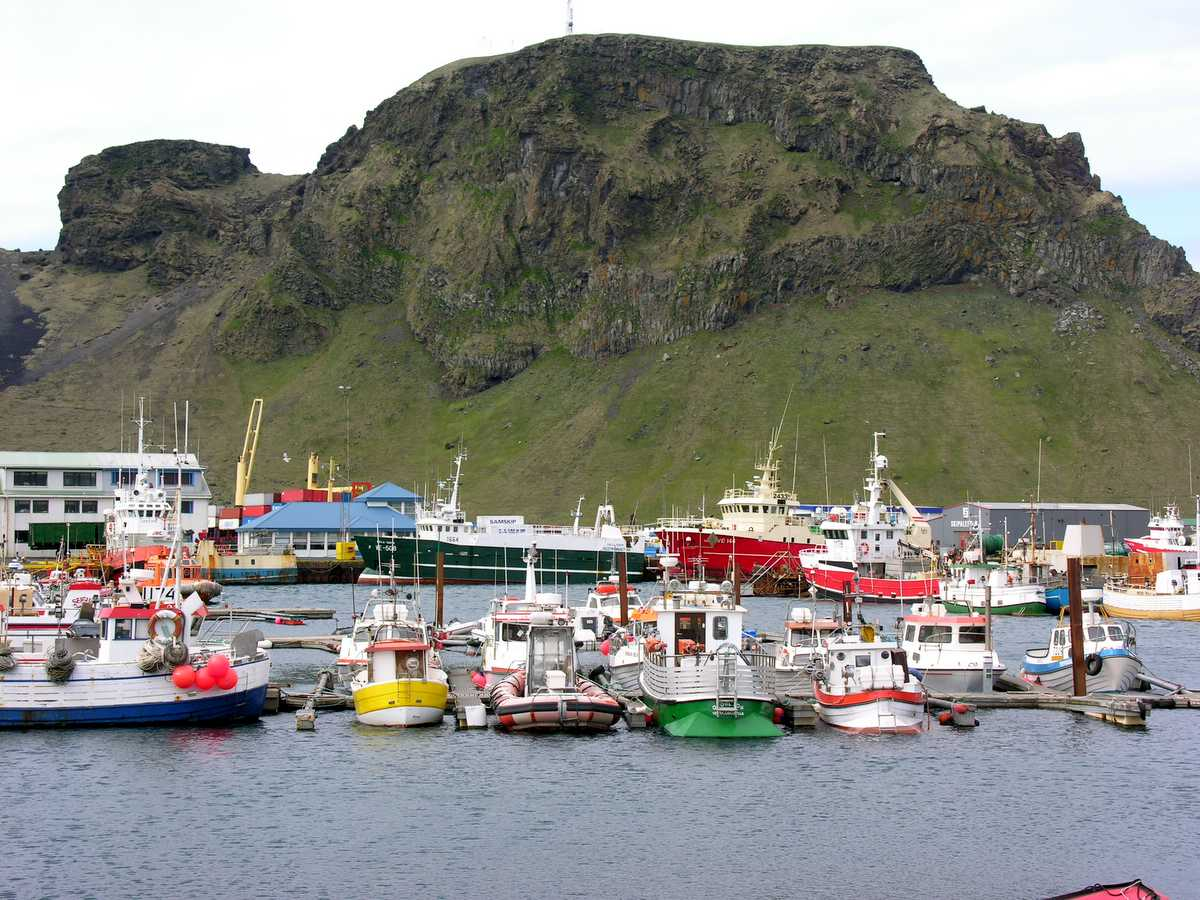 Vestmannaeyjar, Iceland